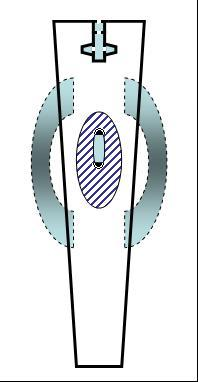 Plan der Anlage